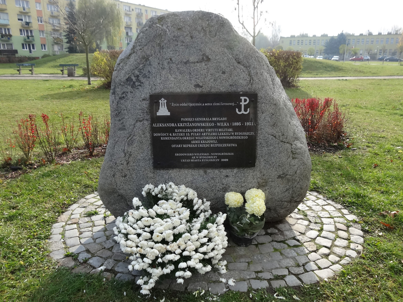 Kamień z tablicą upamietniającą gen. Aleksandra Krzyżanowskiego-Wilka na skwerze na osiedlu Wyżyny w Bydgoszczy